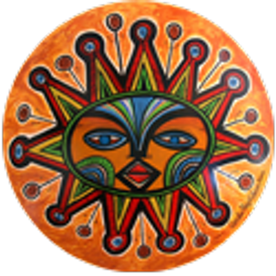 Logo del Canal 7 de Punta, sacado del Twitter del canal.